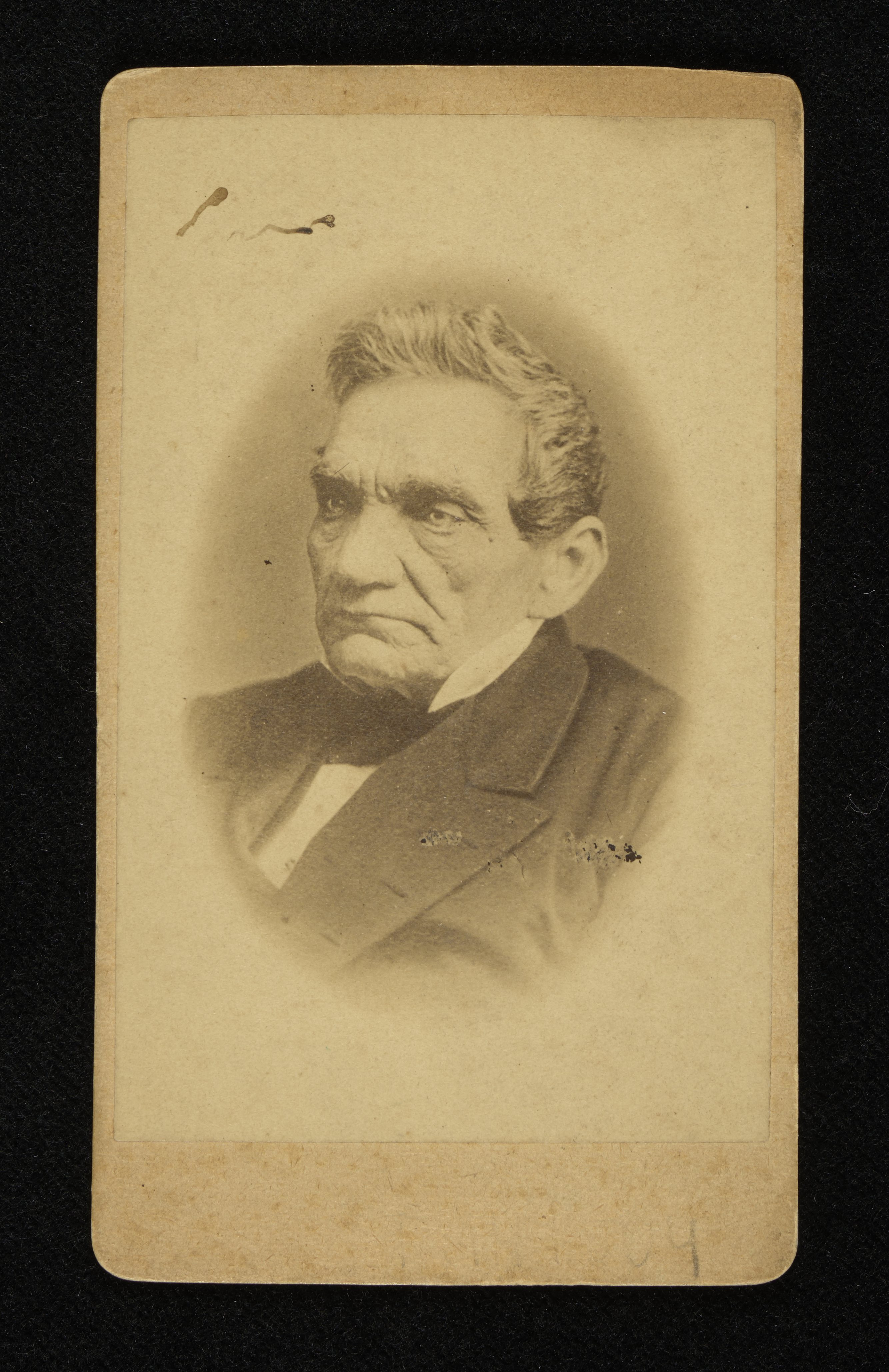 Karol Libelt